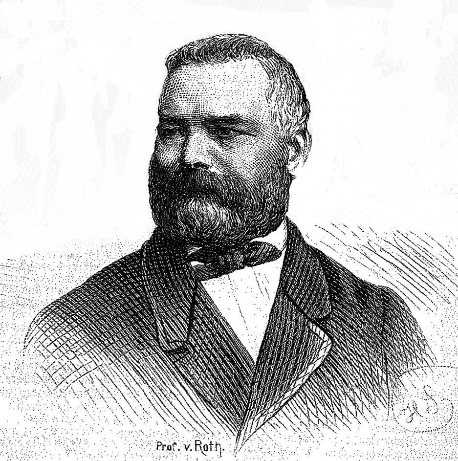 Пауль Рудольф фон Рот (1820—1892) — немецкий юрист.